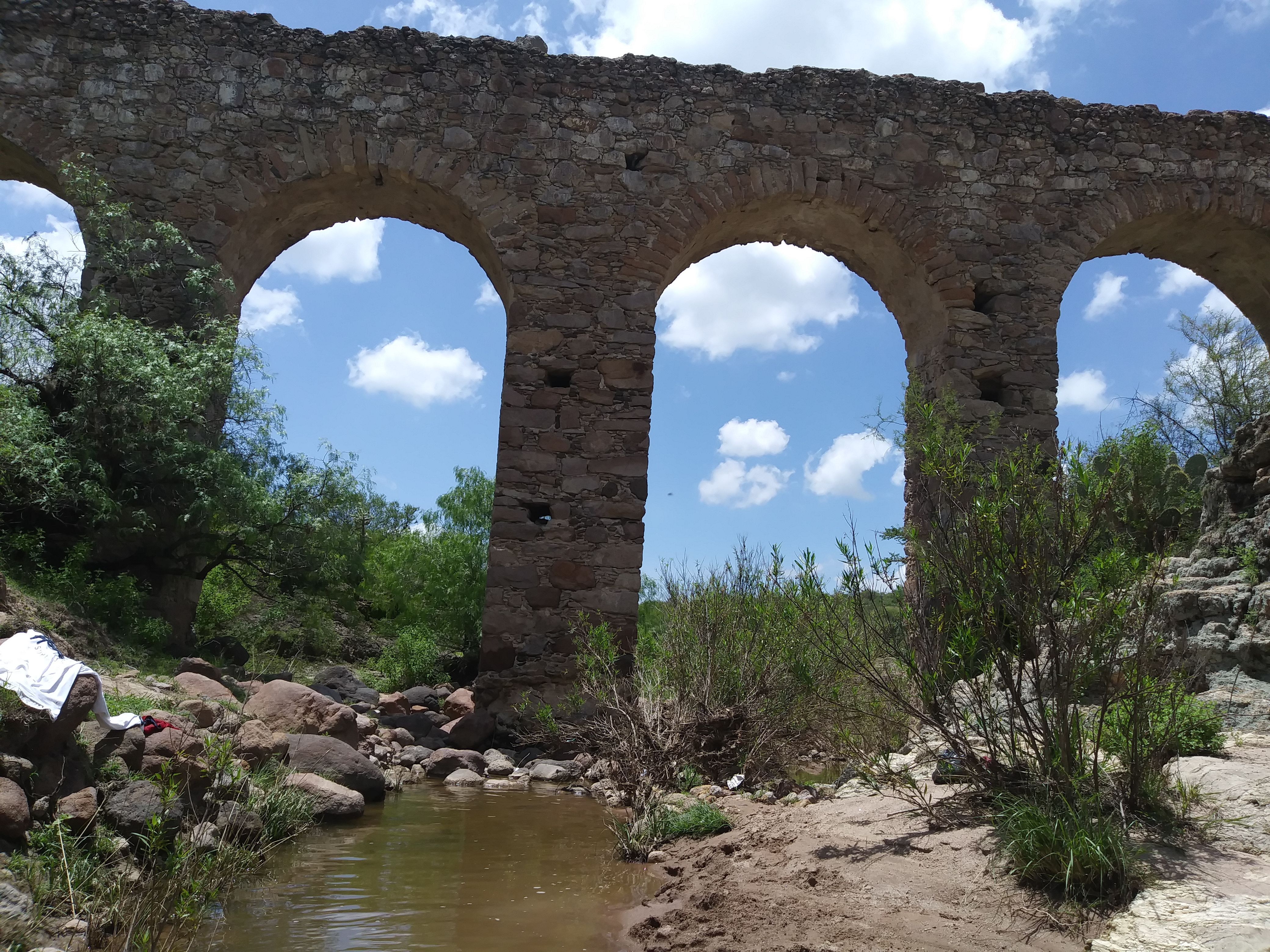 Parte del acueducto de la Ex-Hacienda de Peñuelas